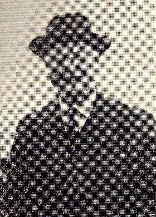 Georges Chabot - francuski geograf.